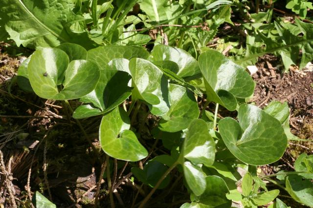 (en) European Ginger Root (Asarum europaeum L.), a photography originating of the internet site The accord of the autor, H. Brisse, is here. (fr) Asaret d'Europe (Asarum europaeum L.), une photographie issue du site internet L'accord de l'auteur, H. Brisse, se situe ici. (de)Europäische Haselwurz, (it)Baccaro comune, (nl)Mansoor